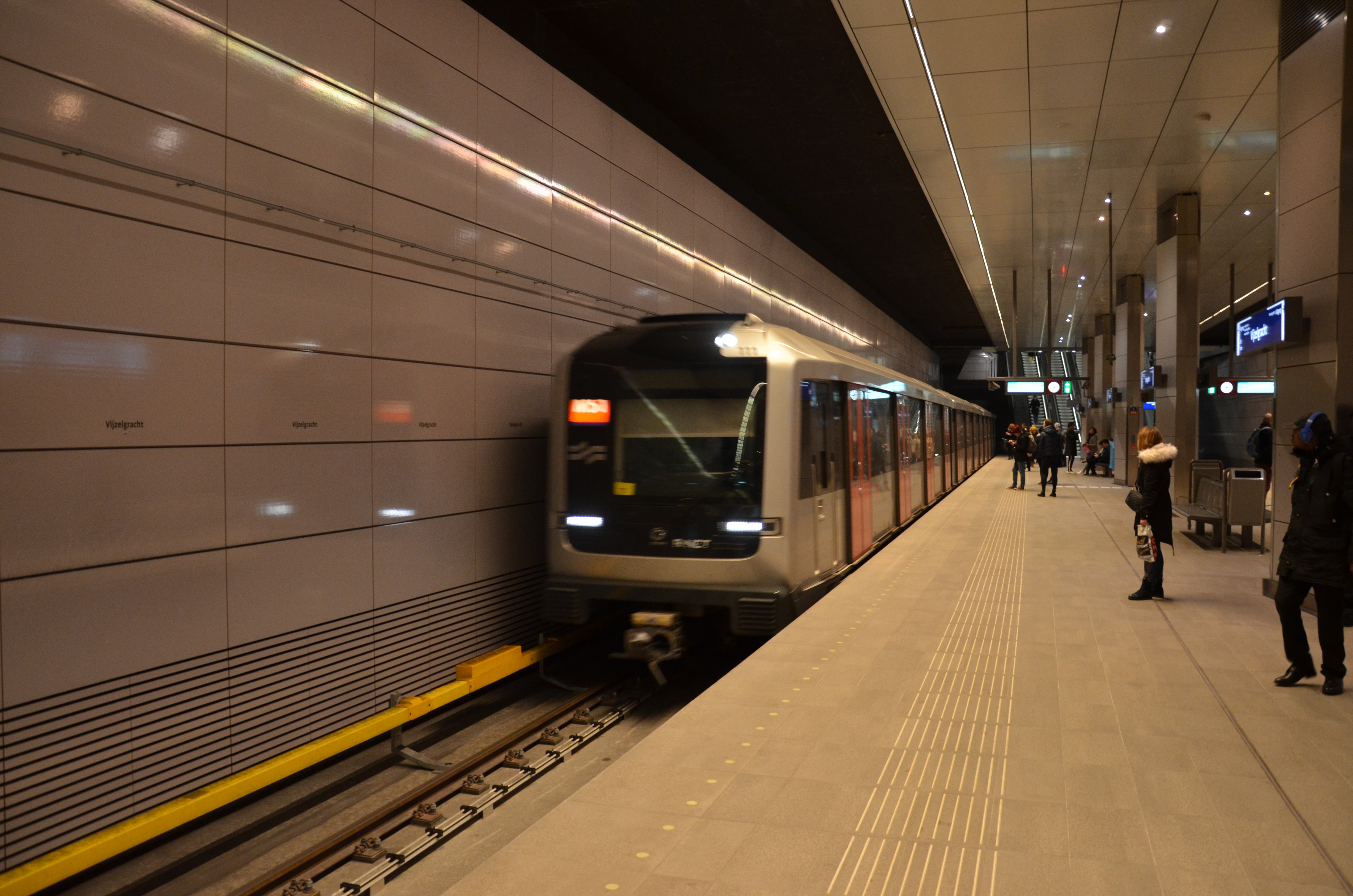 Metrostation Vijzelgracht in Amsterdam.